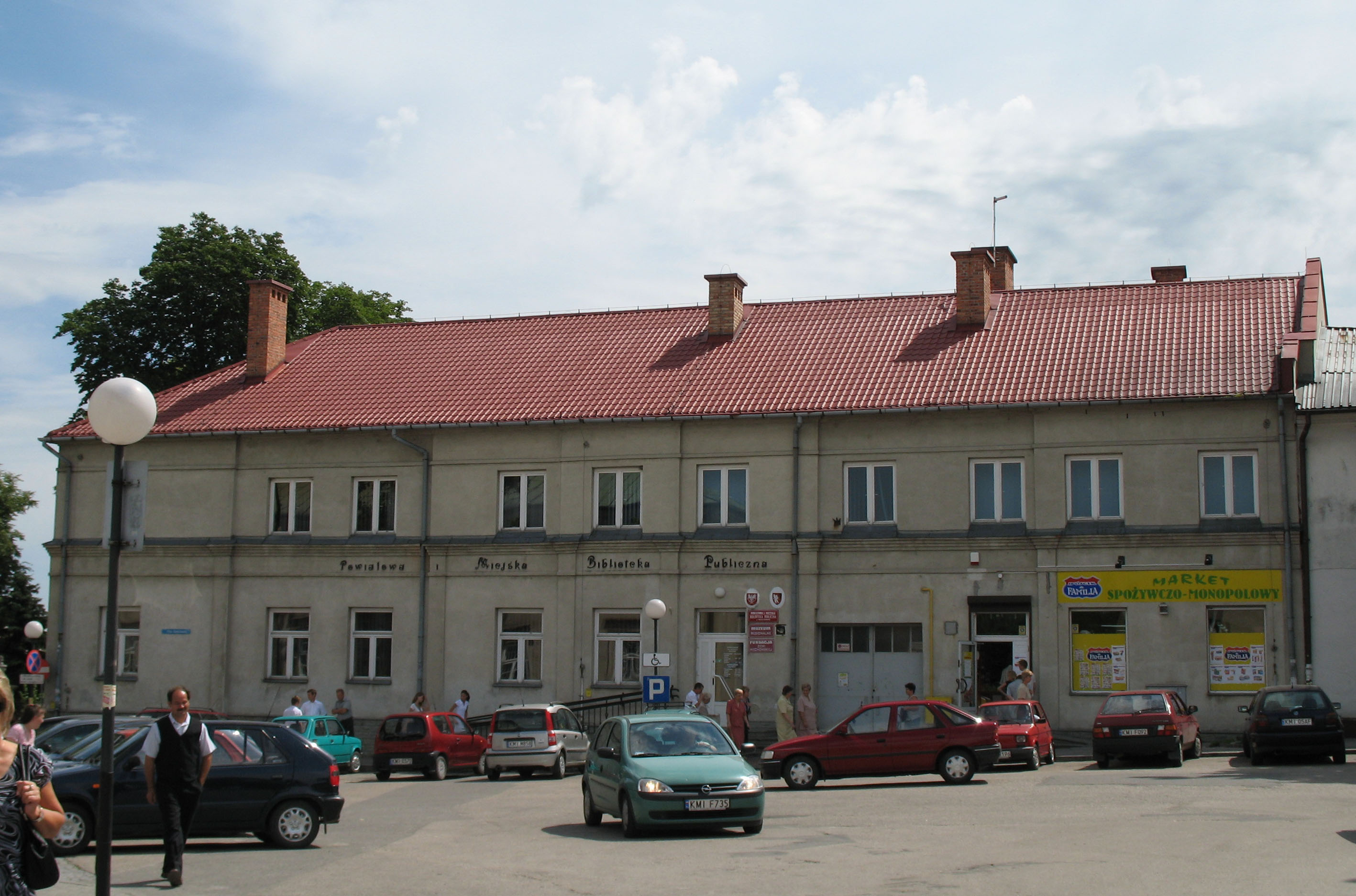 Powiatowa i Miejska Biblioteka Publiczna w Miechowie przy Placu Tadeusza Kościuszki.